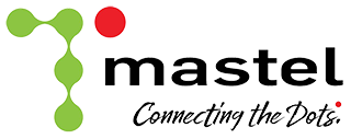 Logo baru ini merupakan logo pengganti yang mulai digunakan oleh MASTEL mulai tahun 2018. Logo ini merupakan simbol yang memperlihatkan konektivtias stake holder di bidand industri telekomunikasi, teknologi informasi dan penyiaran di tanah air.